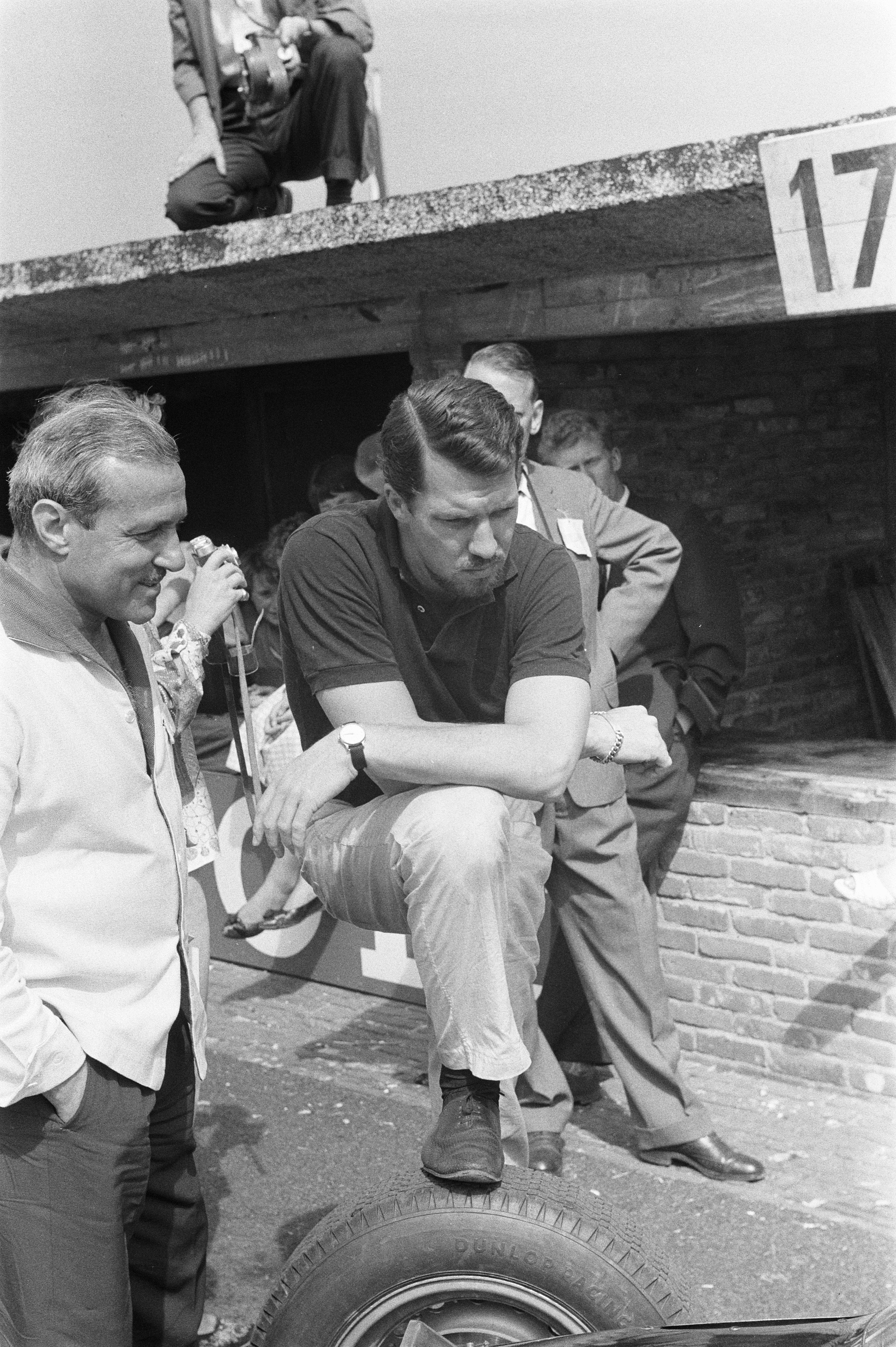 Collectie / Archief : Fotocollectie Anefo Reportage / Serie : [ onbekend ] Beschrijving : Autoraces op het circuit van Zandvoort. De Zweedse Formule 1 coureur Joakim Bonnier wacht tot zijn BRM klaar is Datum : 6 juni 1960 Locatie : Noord-Holland, Zandvoort Trefwoorden : auto's, sport Persoonsnaam : BRM, Bonnier Joakim Fotograaf : Pot, Harry / Anefo Auteursrechthebbende : Nationaal Archief Materiaalsoort : Negatief (zwart/wit) Nummer archiefinventaris : bekijk toegang 2.24.01.05 Bestanddeelnummer : 911-3167